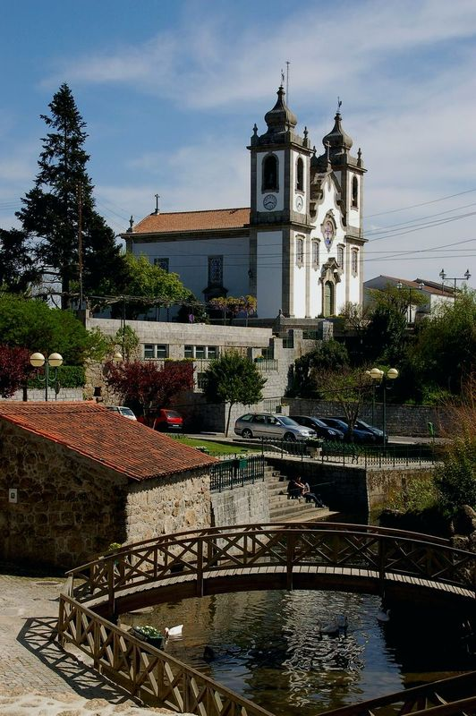 Cidade de Santa Comba Dão